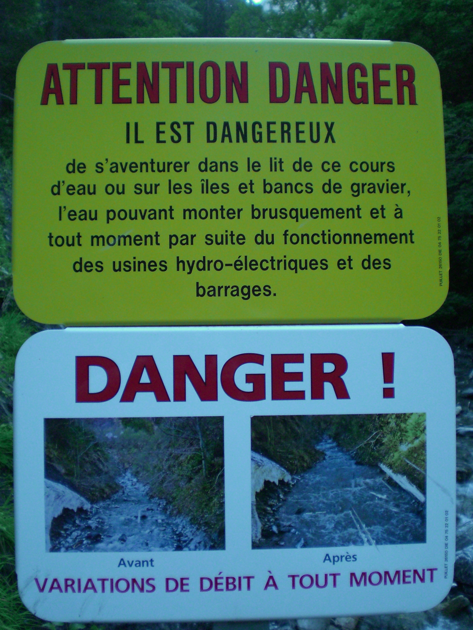 torrent des encombres aux chutes de Planlebon